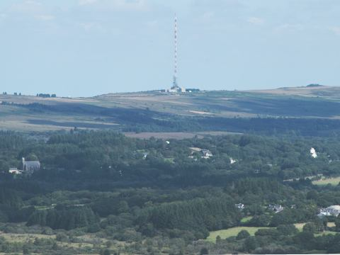 Le Roc'h Tredudon surmonté de son émetteur de télévision dans les Monts d'Arrée